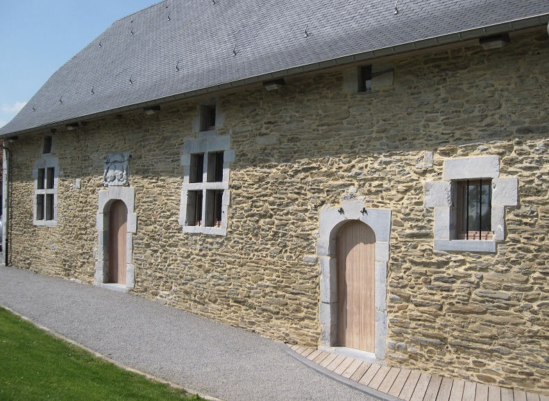 Ancienne Cour de Justice de Hosdent 17e siècle rénovée en 2007